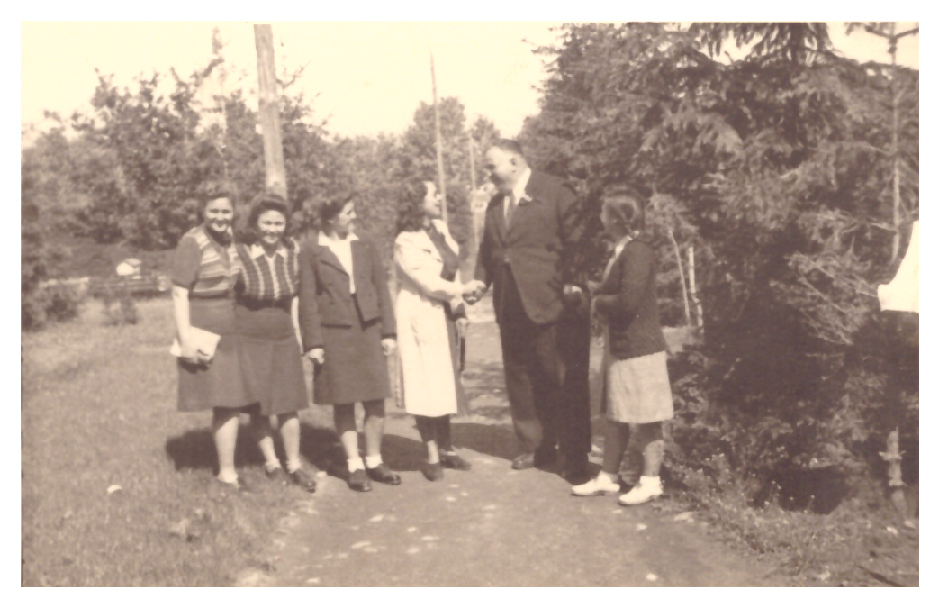 Георги Аракчиев, от 1943 г. директор на Земеделската гимназия в Кюстендил